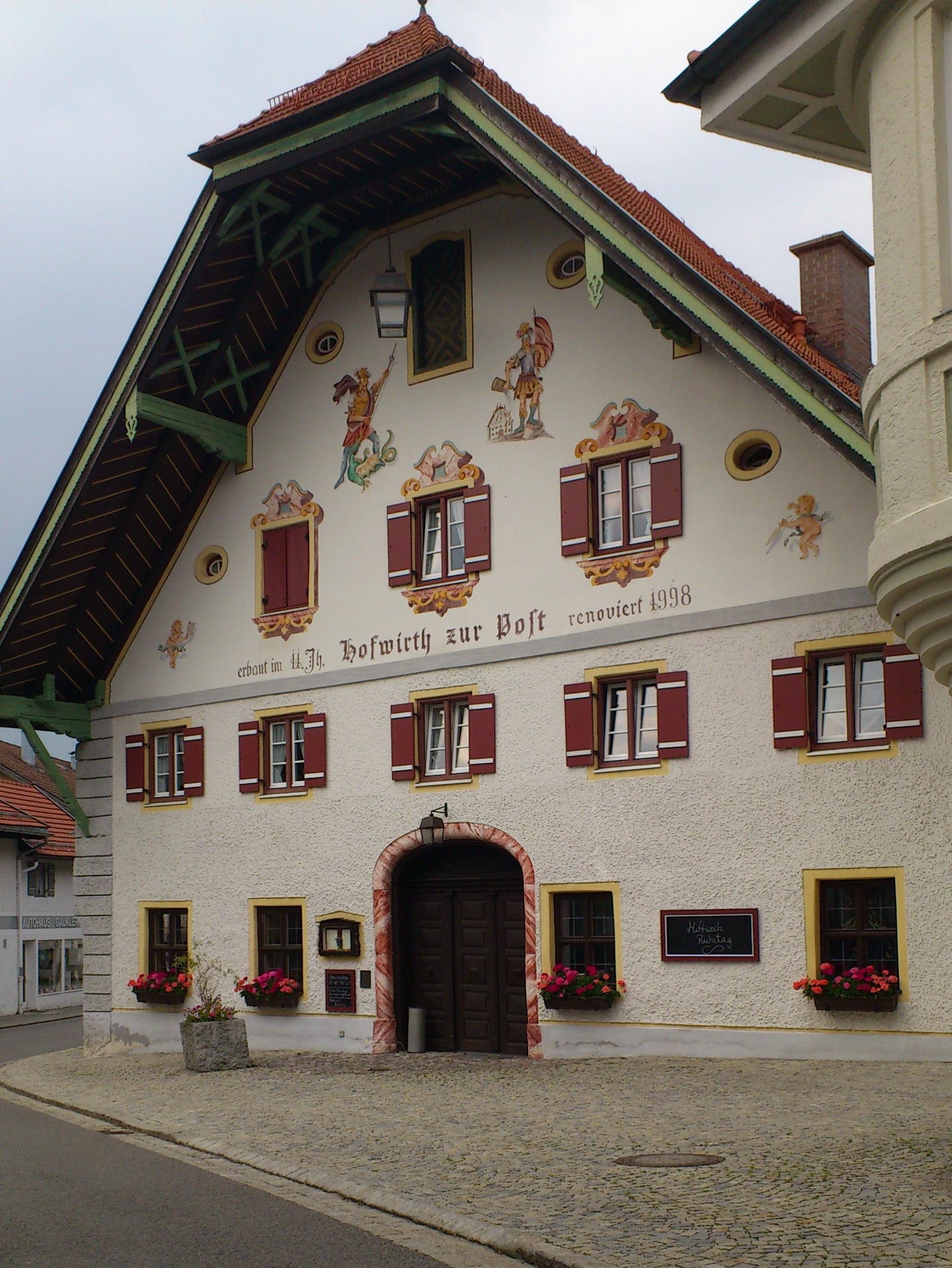 Gasthaus Hofwirt zur Post, stattlicher zweigeschossiger Bau mit steilem überstehenden Schopfwalmdach, im Kern zweite Hälfte 18. Jahrhundert, Dach erneuert Ende 19. Jahrhundert, Gesamtinstandsetzung 1997-99.This is a photograph of an architectural monument.